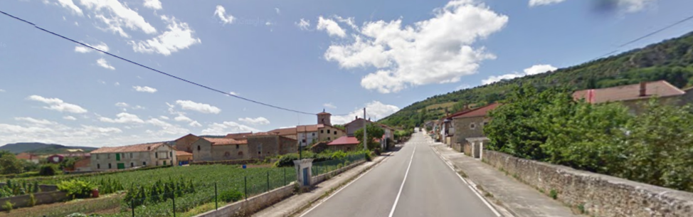 Gayangos herriaren ikuspegia.